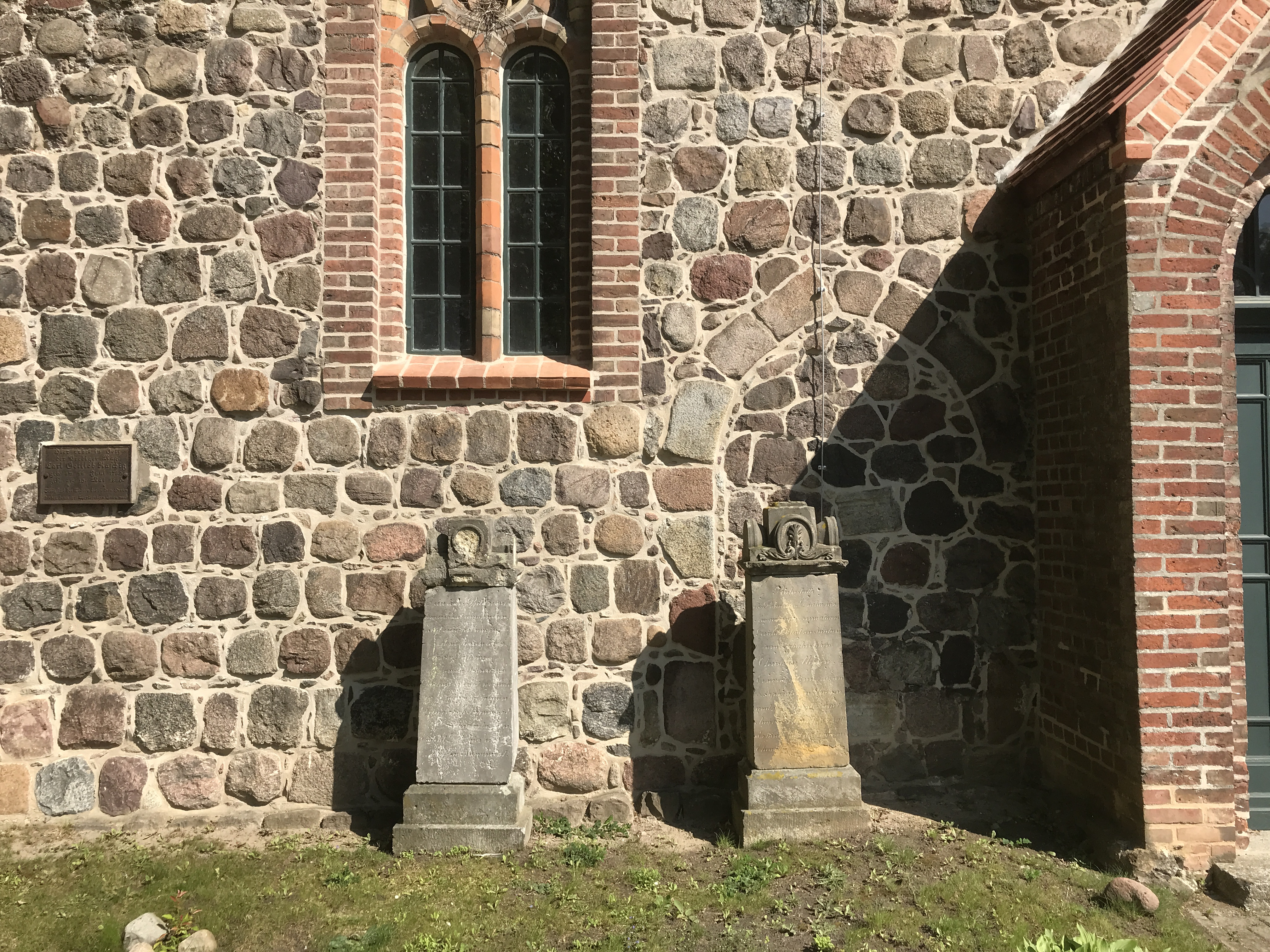 Die Dorfkirche Jacobsdorf in der gleichnamigen Gemeinde im Landkreis Oder-Spree ist eine Feldsteinkirche aus dem 13. Jahrhundert. Im Turm hängen zwei Glocken aus dem 14. Jahrhundert sowie aus dem Jahr 1580.